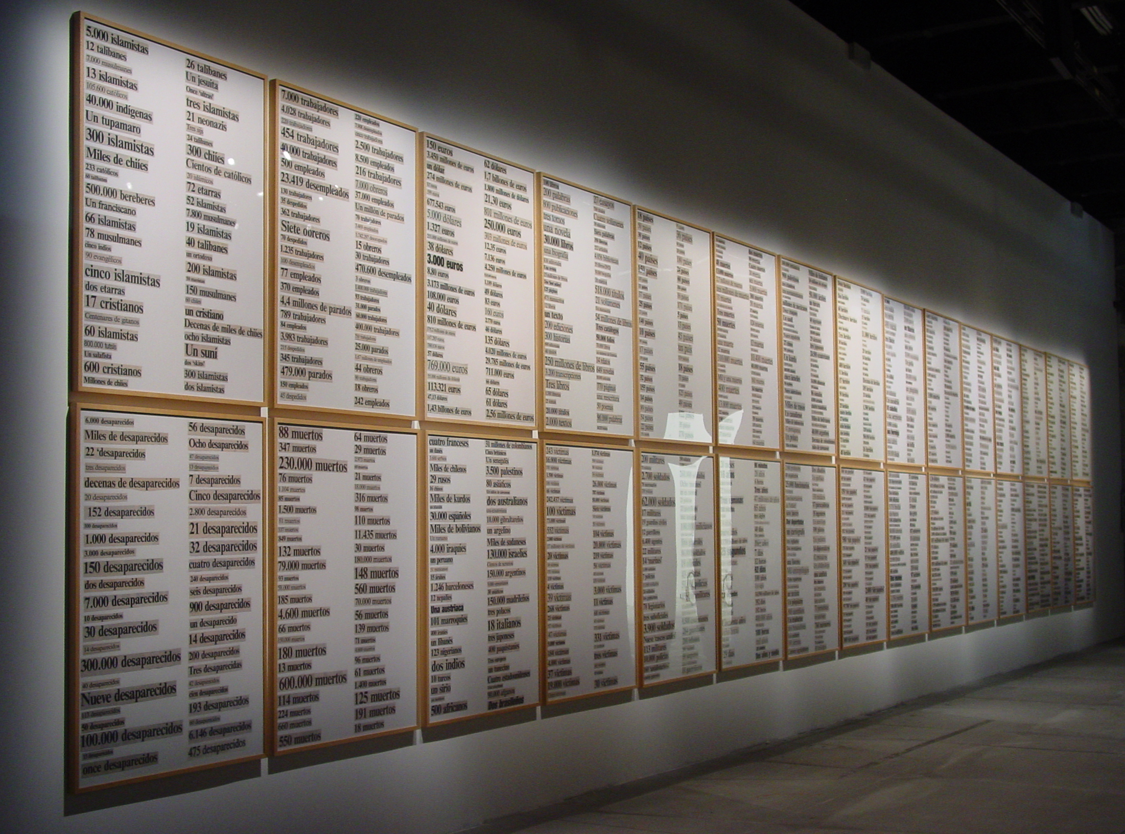 Llistats. 52a Bienal de Venècia, 2007.